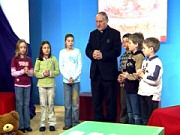 Kindersendung: Pfr. Buschor mit Kindern